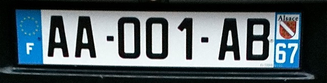 Neues französisches Kennzeichen